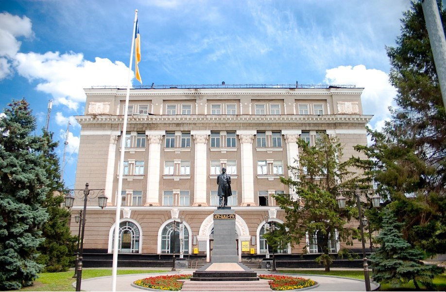 Головпоштамп (Кривий Ріг)